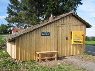 StoppOmat Zielhaus